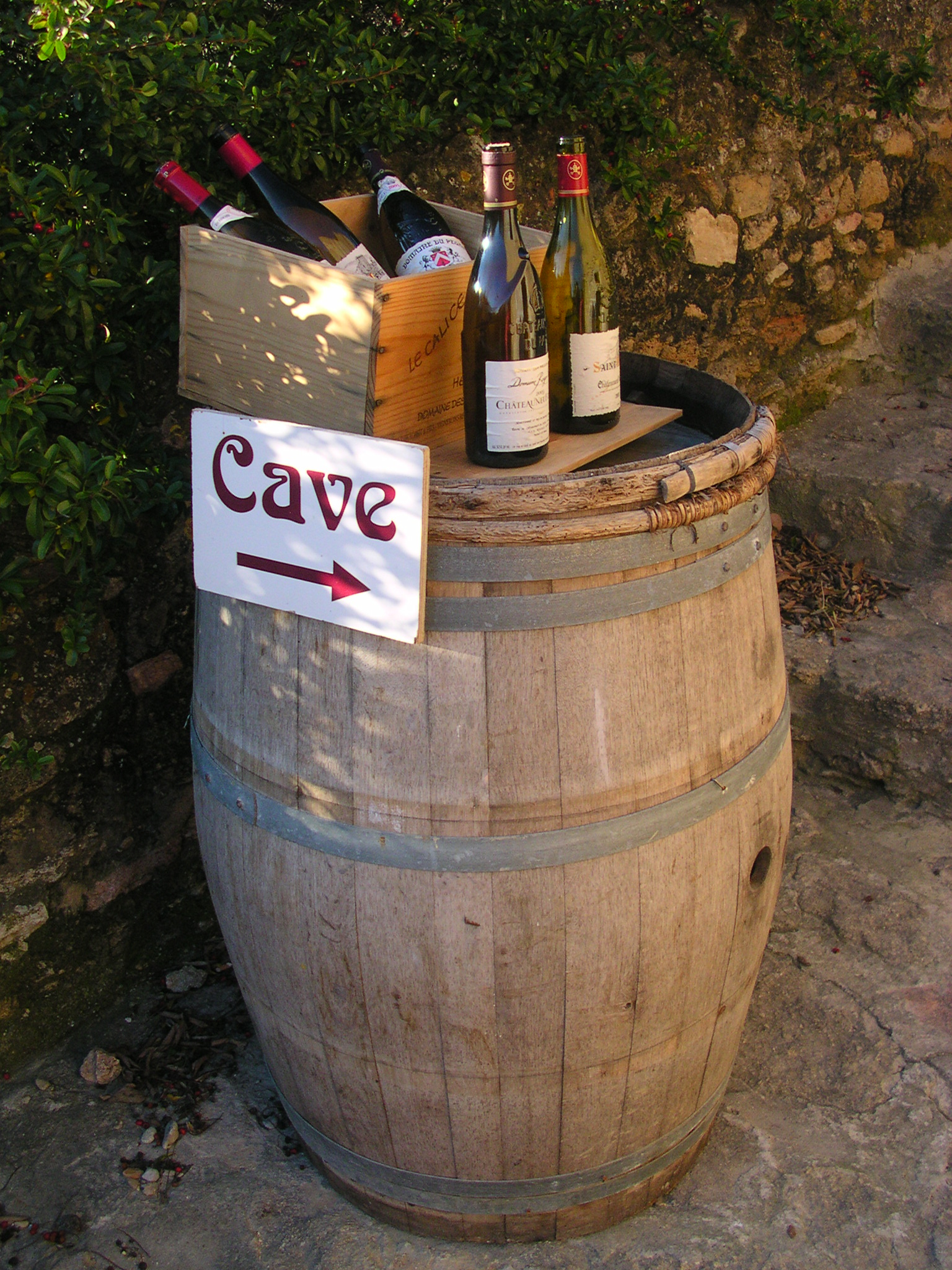 Entrée de la cave du domaine du Pégau